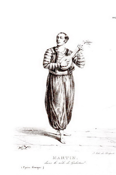 Jean-Blaise-Nicolas Martin dans le rôle de Gulistan, joue debout de face d’un instrument à cordes. Il revêt une veste sans manche et une chemise brodées alors que son sarouel ceint par une écharpe gagne presque ses babouches